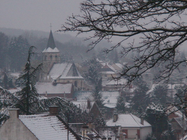 Eglise de Bouvigny Boyeffles et centre du village